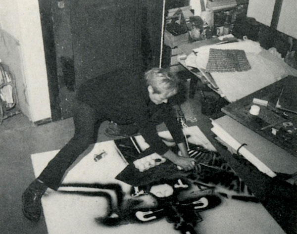 Irma Hünerfauth 1965 bei der Arbeit an dem Bild "Der Mongole geht über die Strasse"